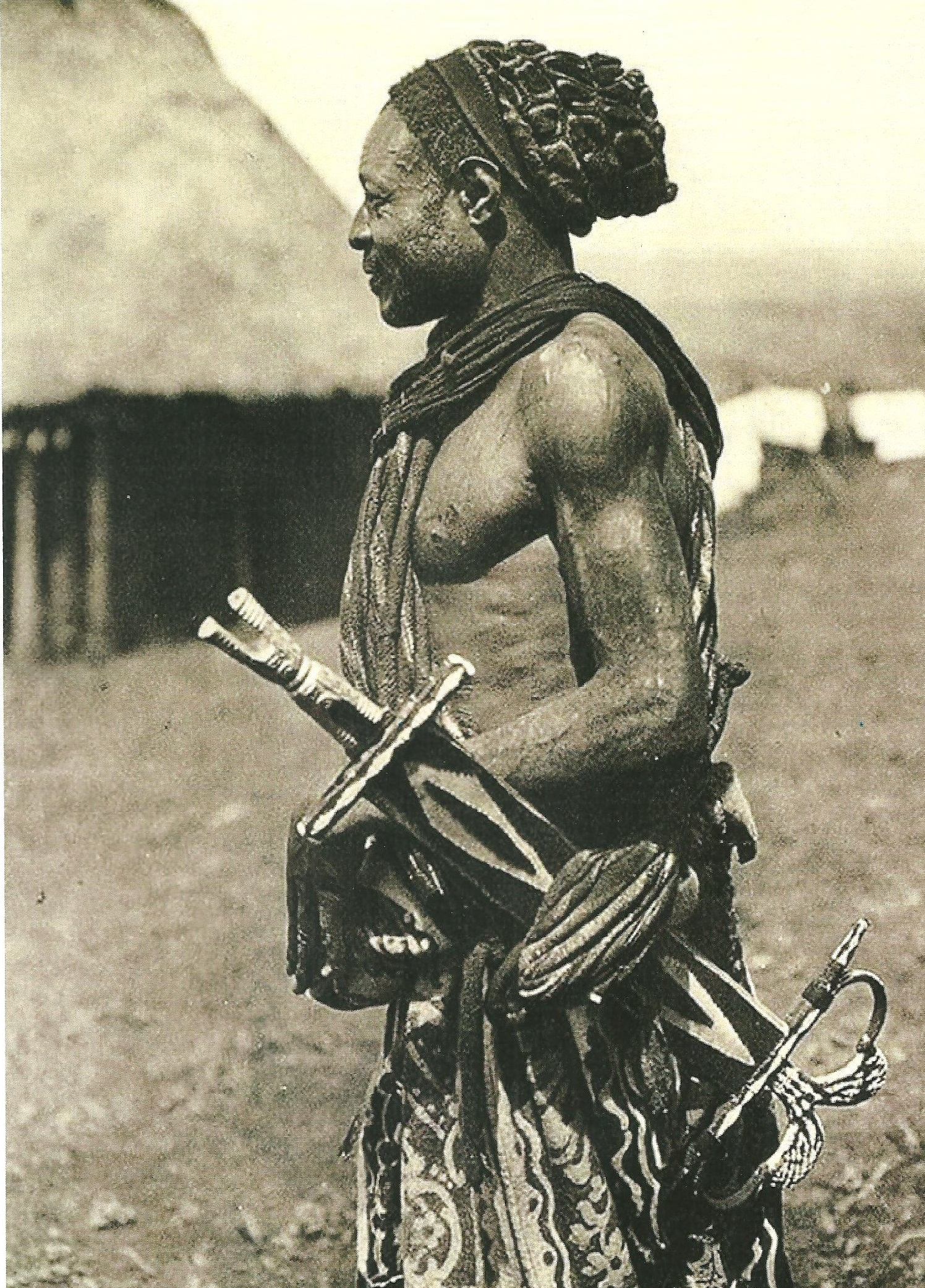 Photo du Roi Fotso II